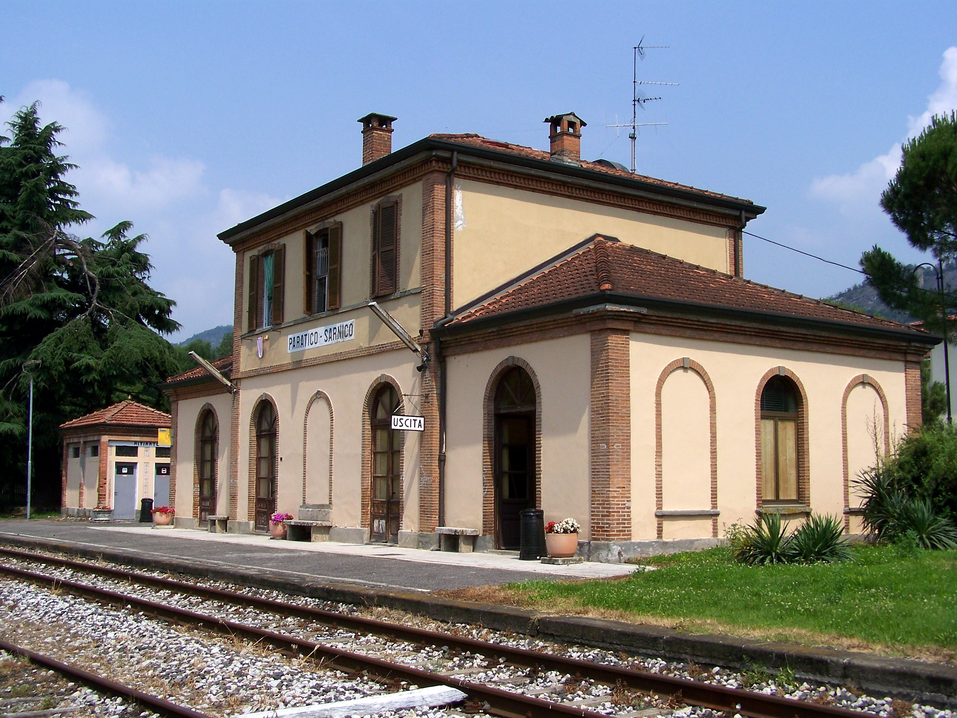 Lato ferrovia della stazione di Paratico-Sarnico sulla ferrovia Palazzolo-Paratico